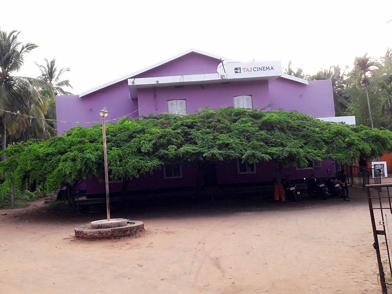 മലപ്പുറം ജില്ലയിലെ പൊന്നാനി താലൂക്കില്‍ പാലപ്പെട്ടി താജ് ടാക്കീസില്‍ തണല്‍ ഒരുക്കുന്ന ഡിവി ഡിവി മരങ്ങള്‍.